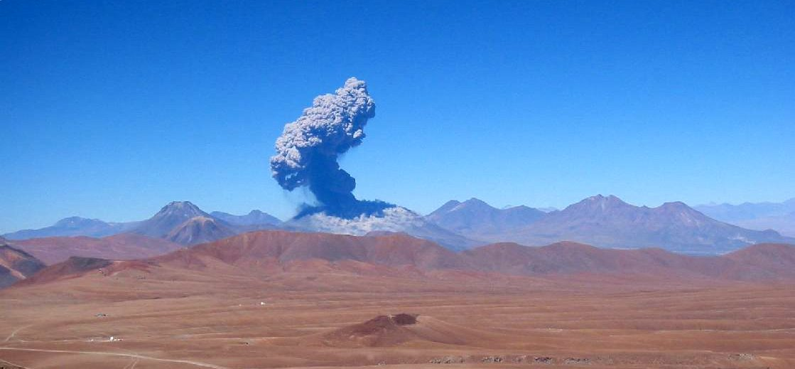 2006 eruption of Lascar Volcano. Flickr caption: "La tos del Lascar".